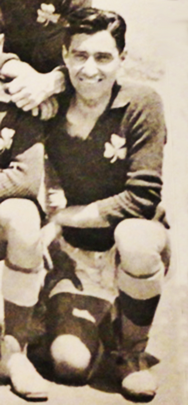 Ο αθλητής ποδοσφαίρου και σκοποβολής του Παναθηναϊκού Αθανάσιος Αραβοσιτάς